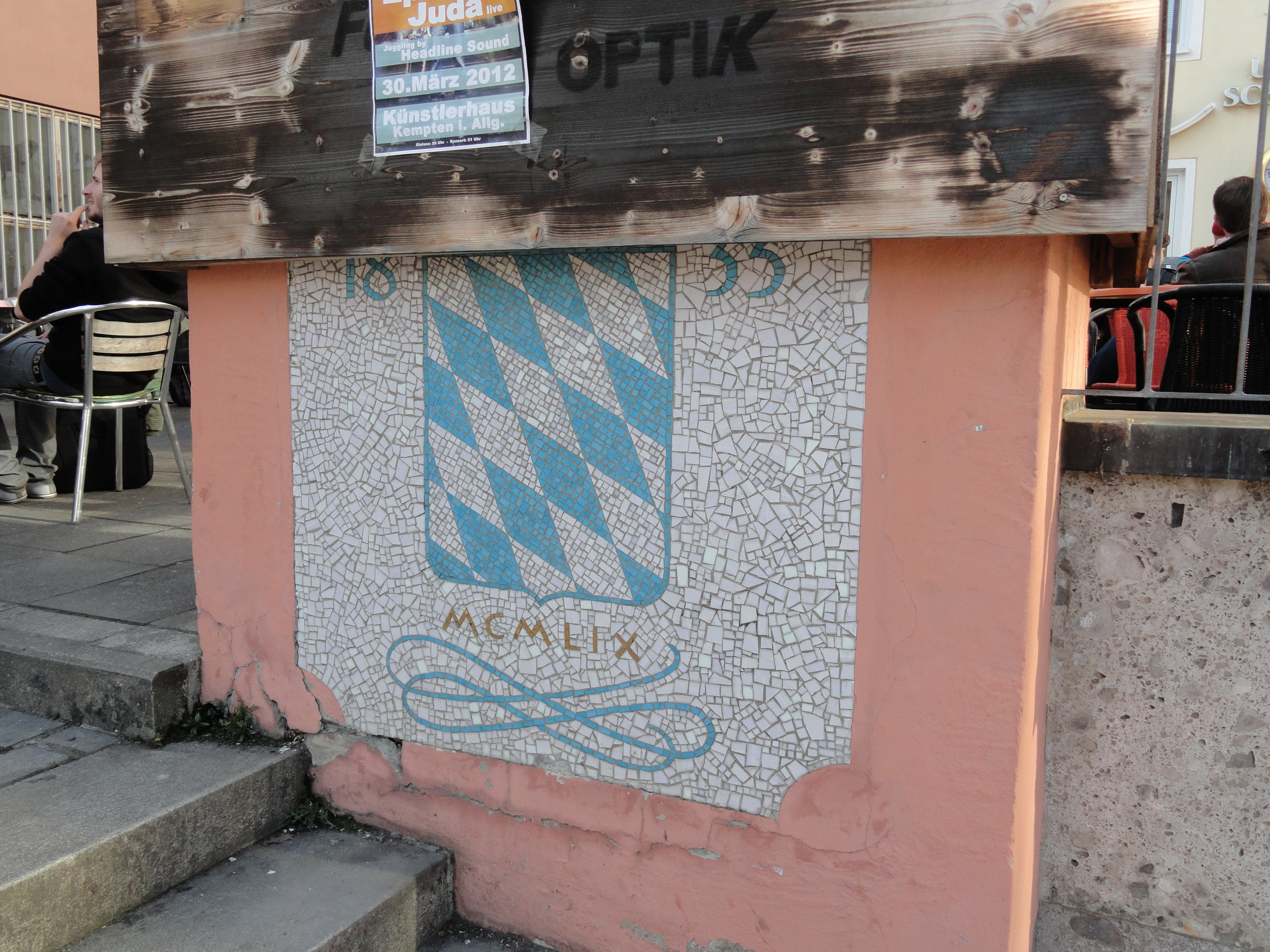 Künsterhaus in Kempten; Einwurfkasten - Bankschließfächer - Bayerisches Wappen